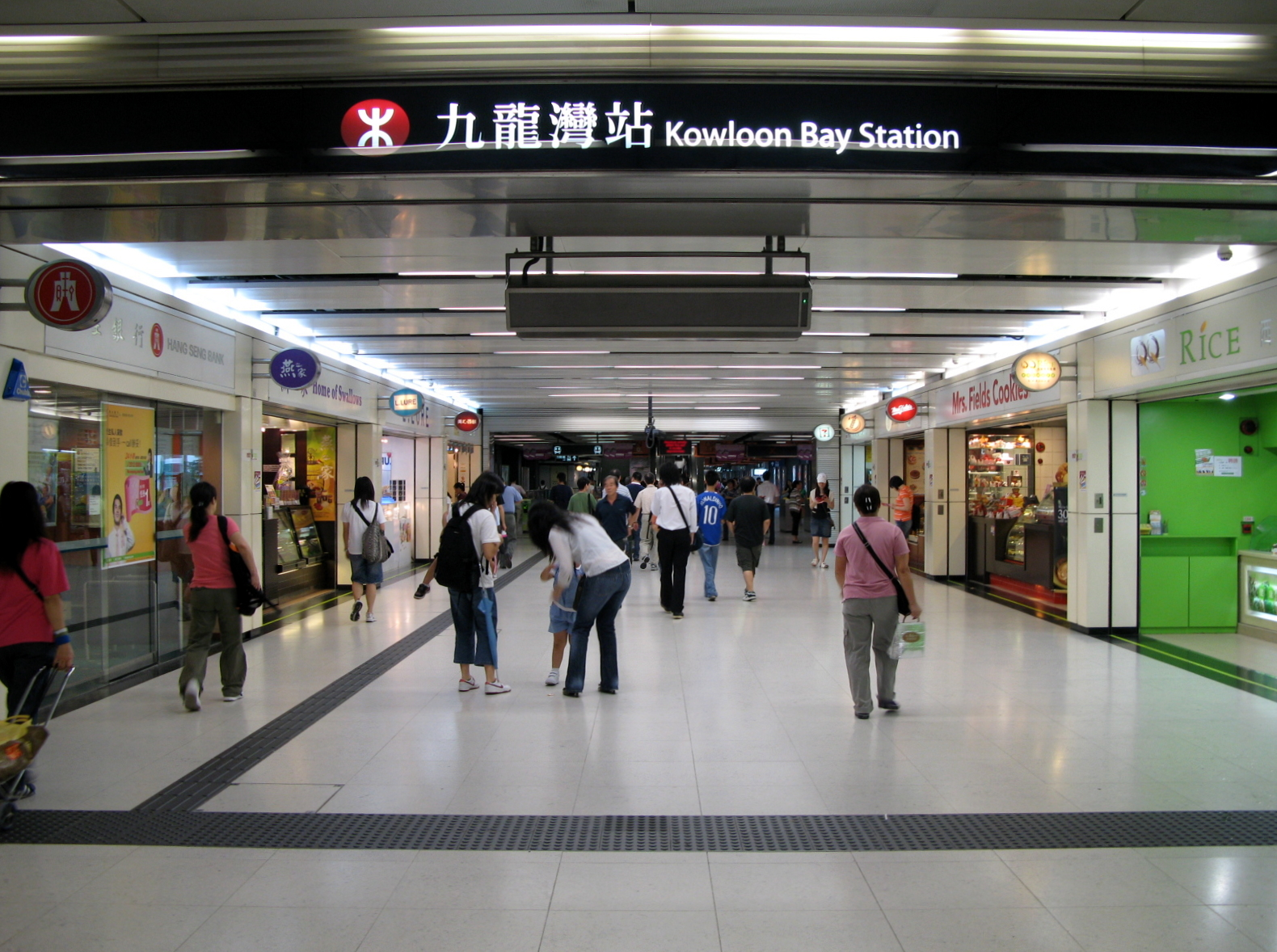 HKMTR Kowloon Bay Station